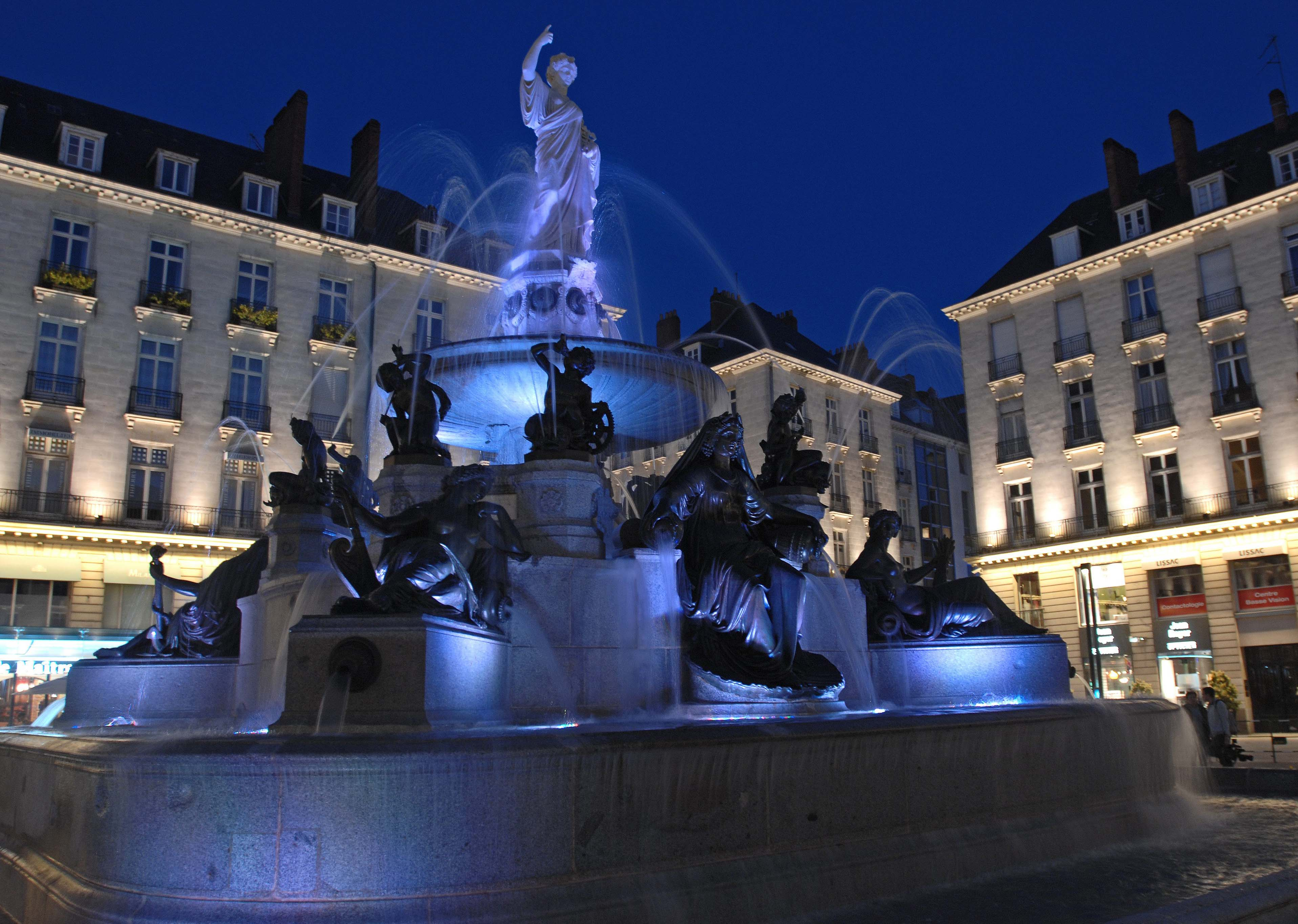 La place Royale depuis sa mise en lumière en avril 2007